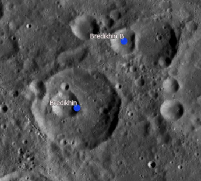 Cráter lunar Bredikhin. Cráteres satélite. (Imagen LRO)